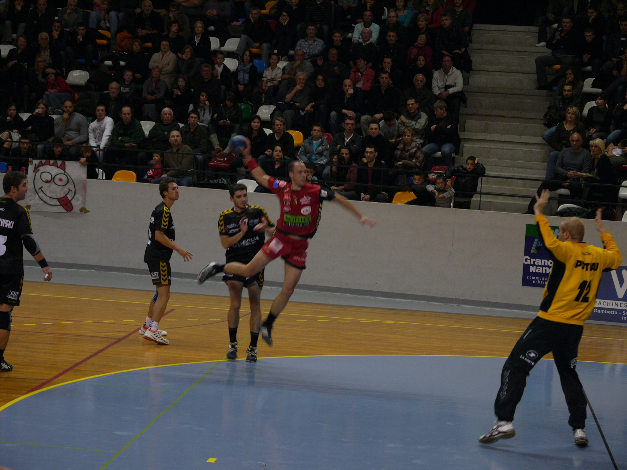 handball masculin championnat de france